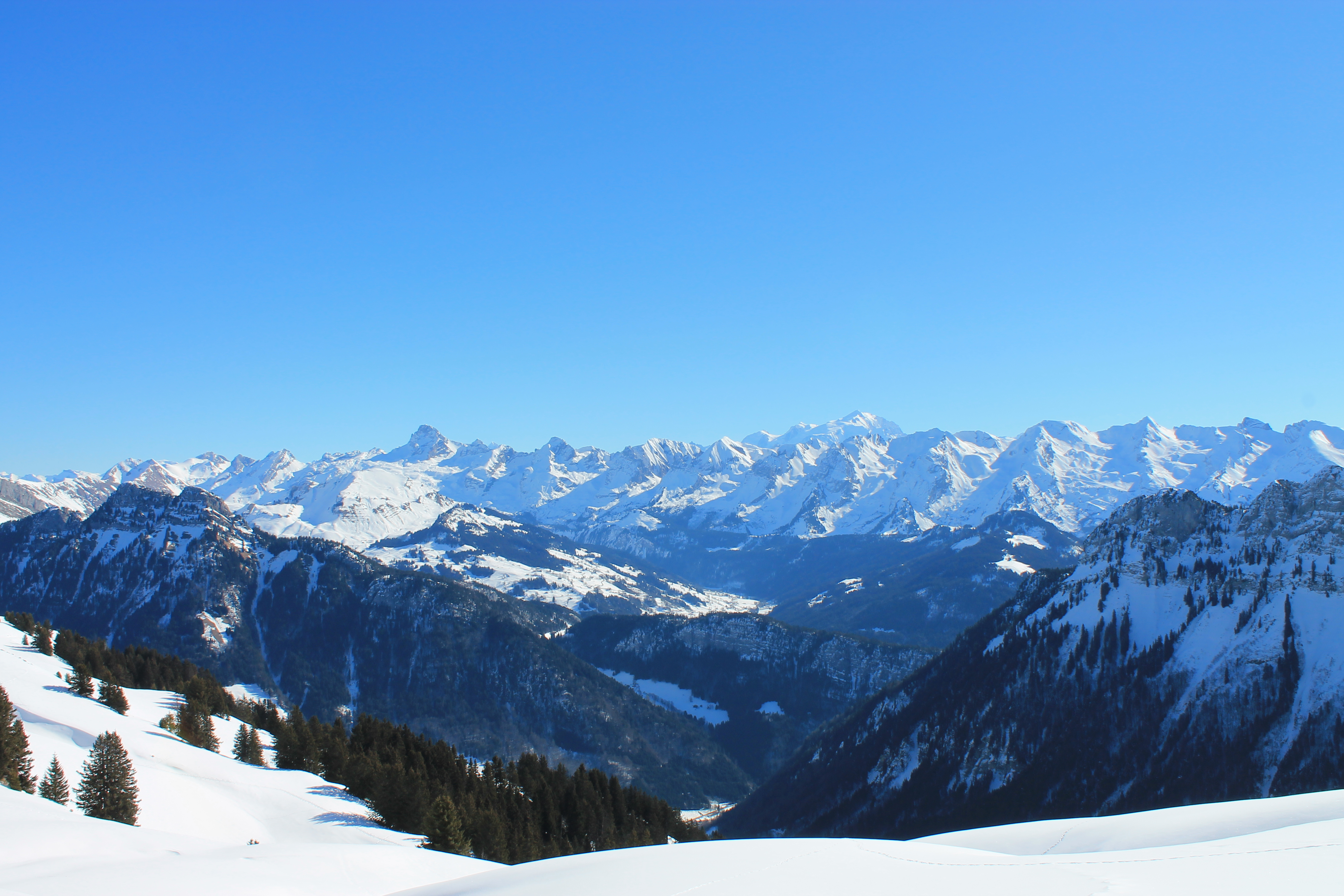 Vue depuis le plateau d'Auges sur la vallée du Borne et d'Entremont en contrebas, au second plan la chaîne des Aravis et en arrière-plan le Mont-Blanc